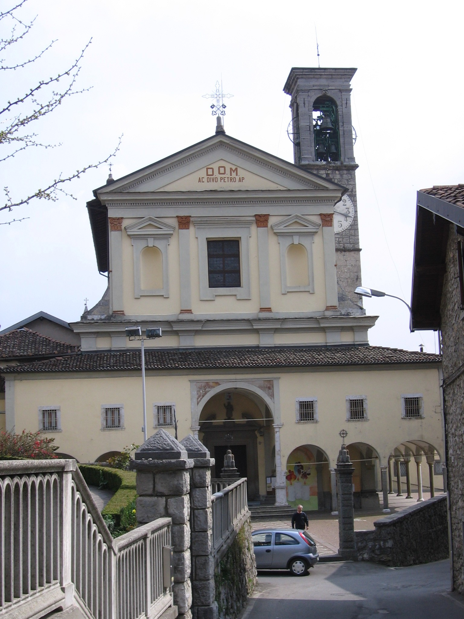 Parre, Bergamo, Italia